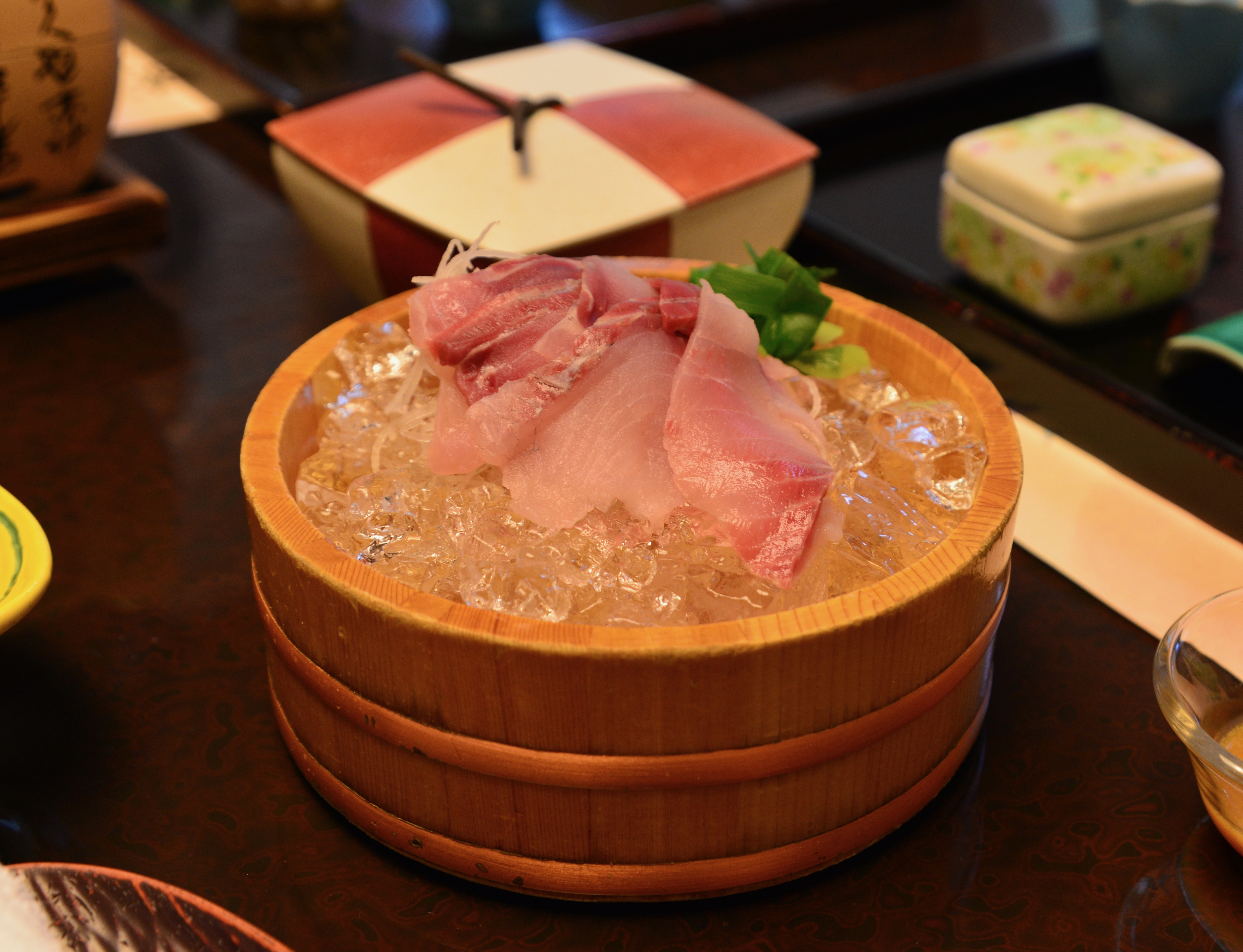 鯉の洗い 新潟県三条市越後長野温泉嵐渓荘にて